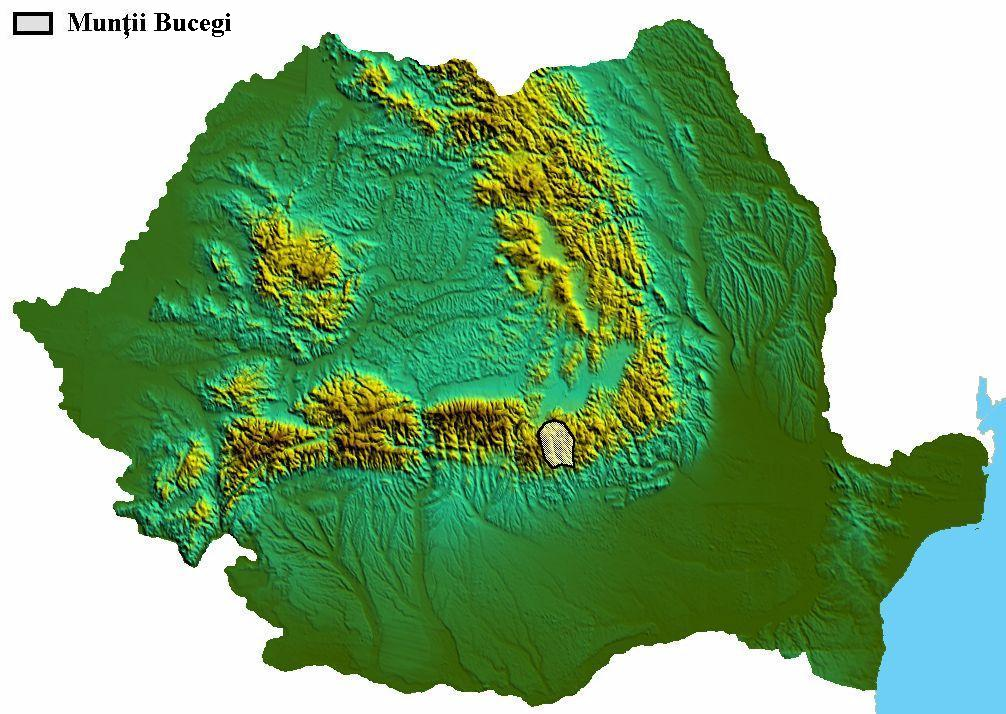 Muntii Bucegi